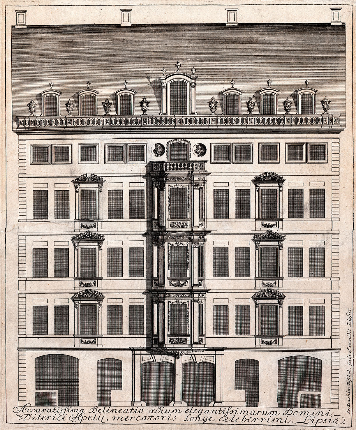 Ansicht von Apels Haus in Leipzig, Stich von Johann Joachim Püschel, um 1715, Stadtmuseum Leipzig, Inv.-Nr. 826